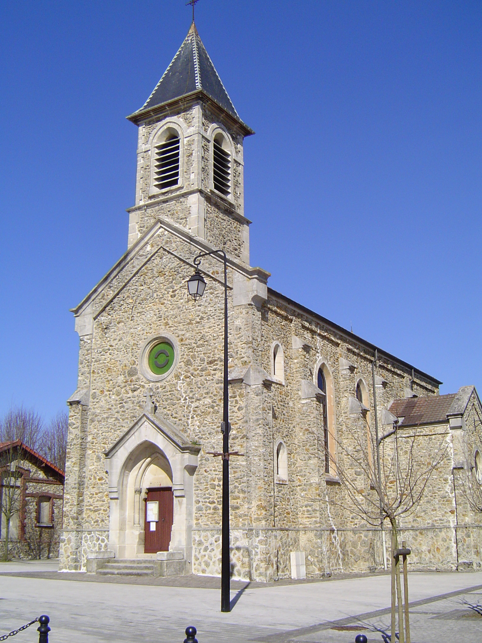 Photos prises à Lognes, commune française de Seine-et-Marne